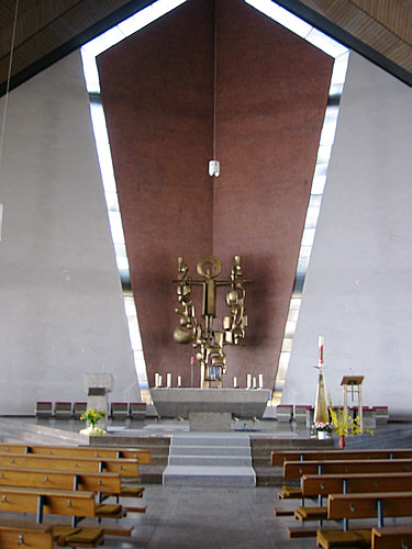 Altarraum der katholischen Pfarrkirche Zur Heiligen Familie in Würzburg-Heidingsfeld